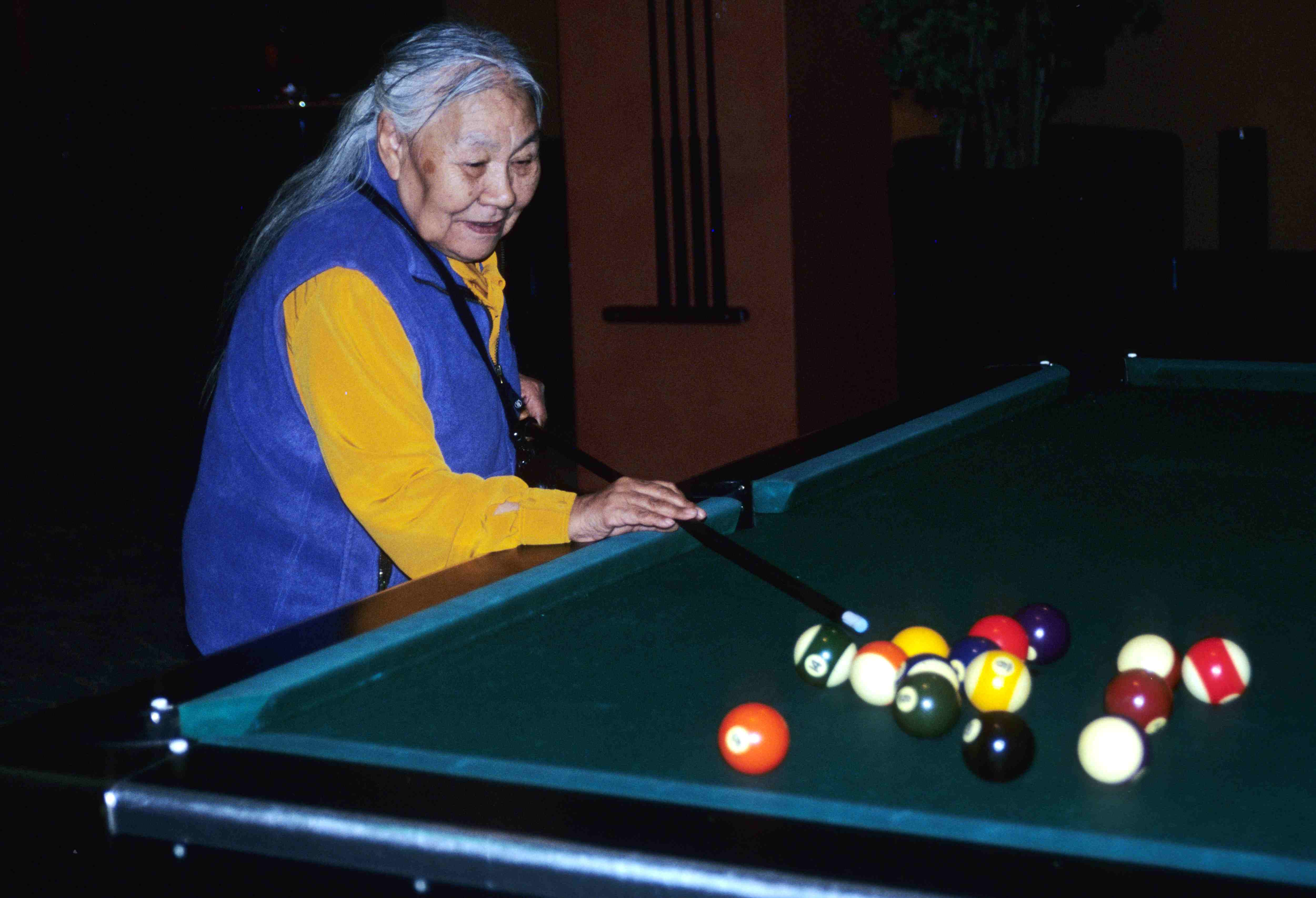 Inuit artist Kenojuak playing billiards in Berlin Hotel